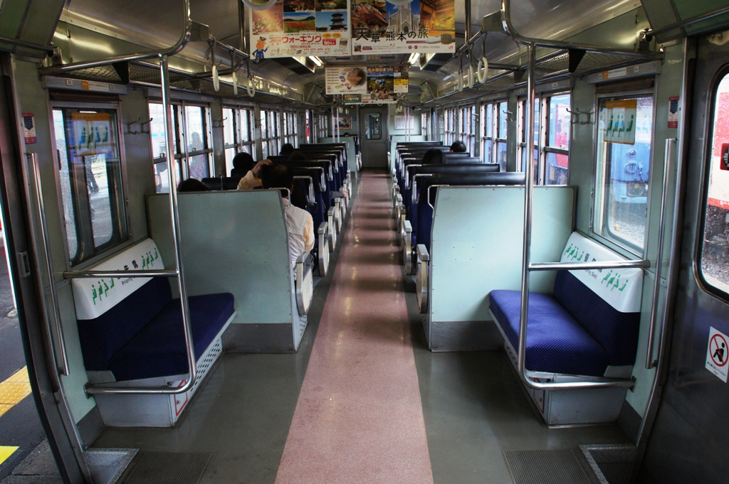 キハ66-8の車内です。